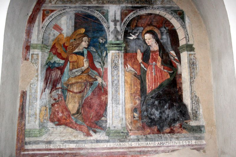 Affresco: Annunciazione - chiesa di Sant'Agostino (Amatrice)